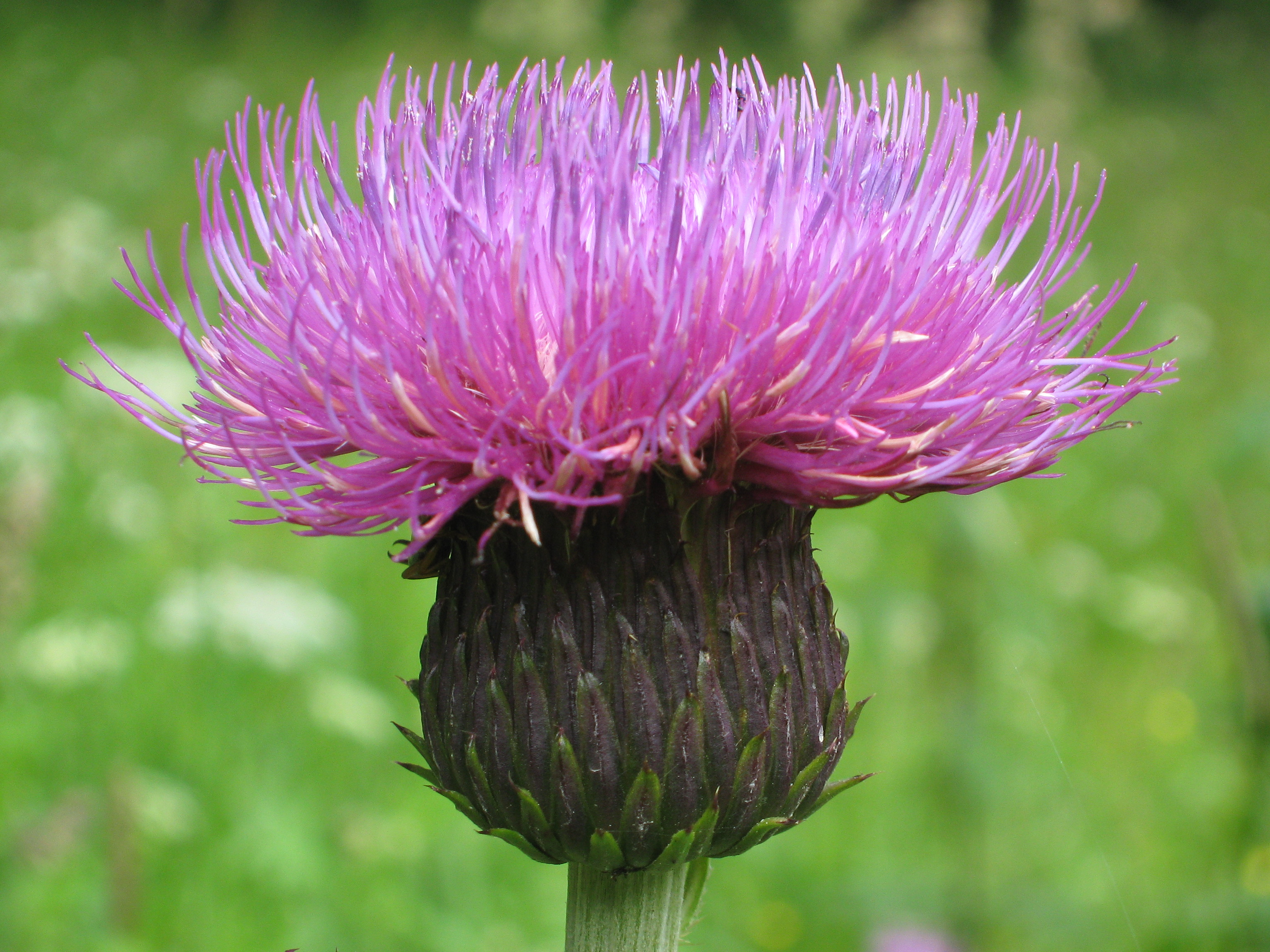 Verschiedenblättrige Kratzdistel, Blütenstand